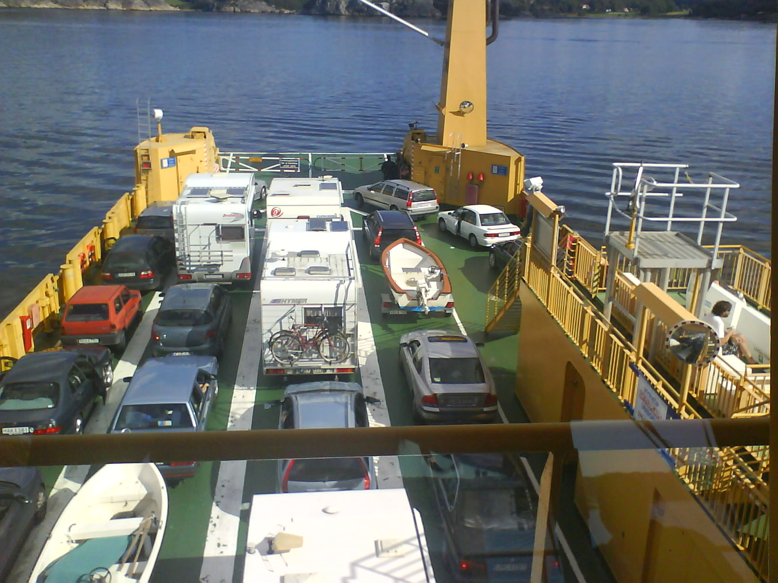 Den svenska bilfärjan M/S Gullbritt